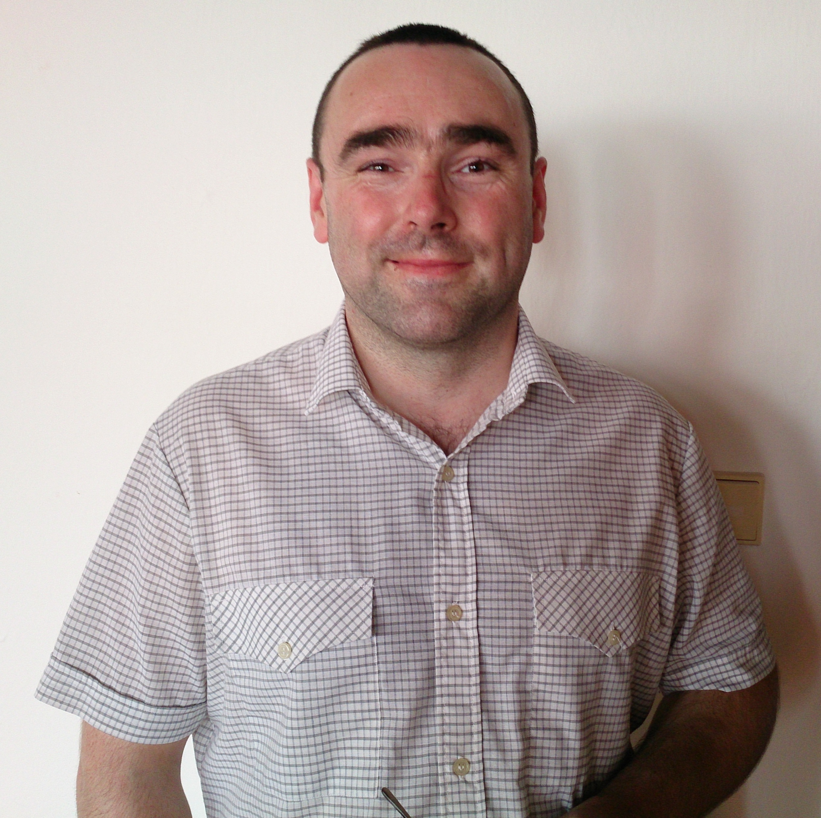 Přednáška Lukáše Lhoťana v Teplickém Kulturním domě. Přednáška proběhla 6. září 2014, od 16. do 18. hodiny.